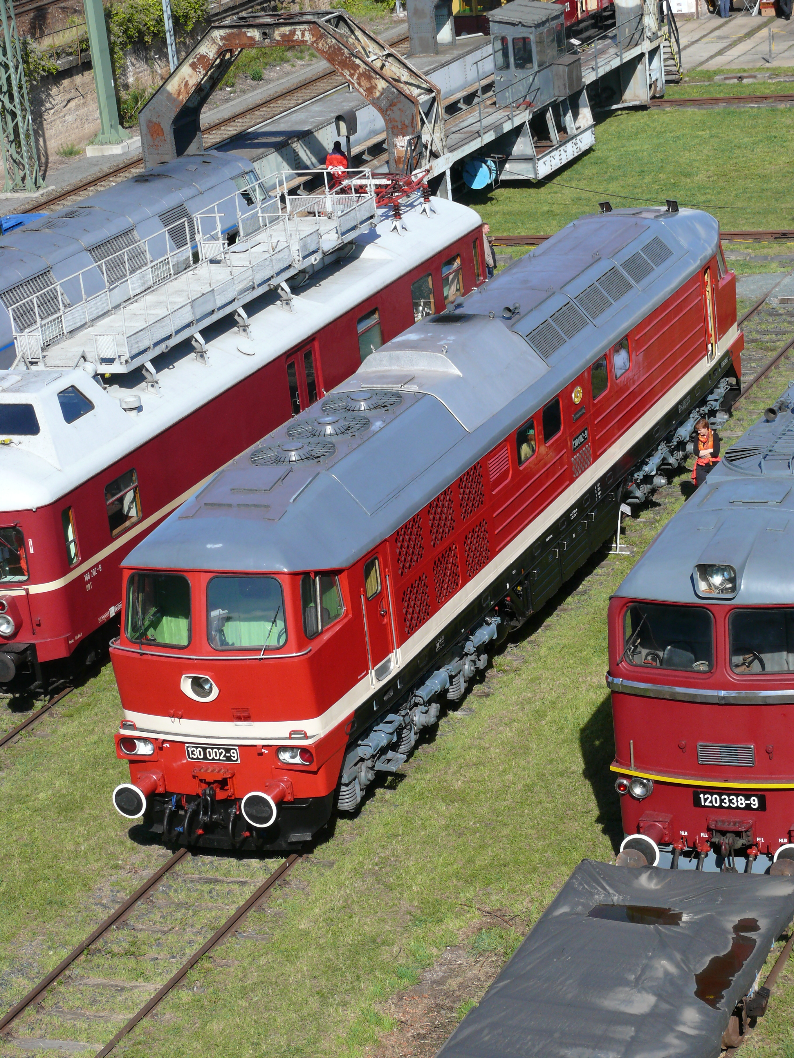 Saisonabschlussfest vom 30.09.2012